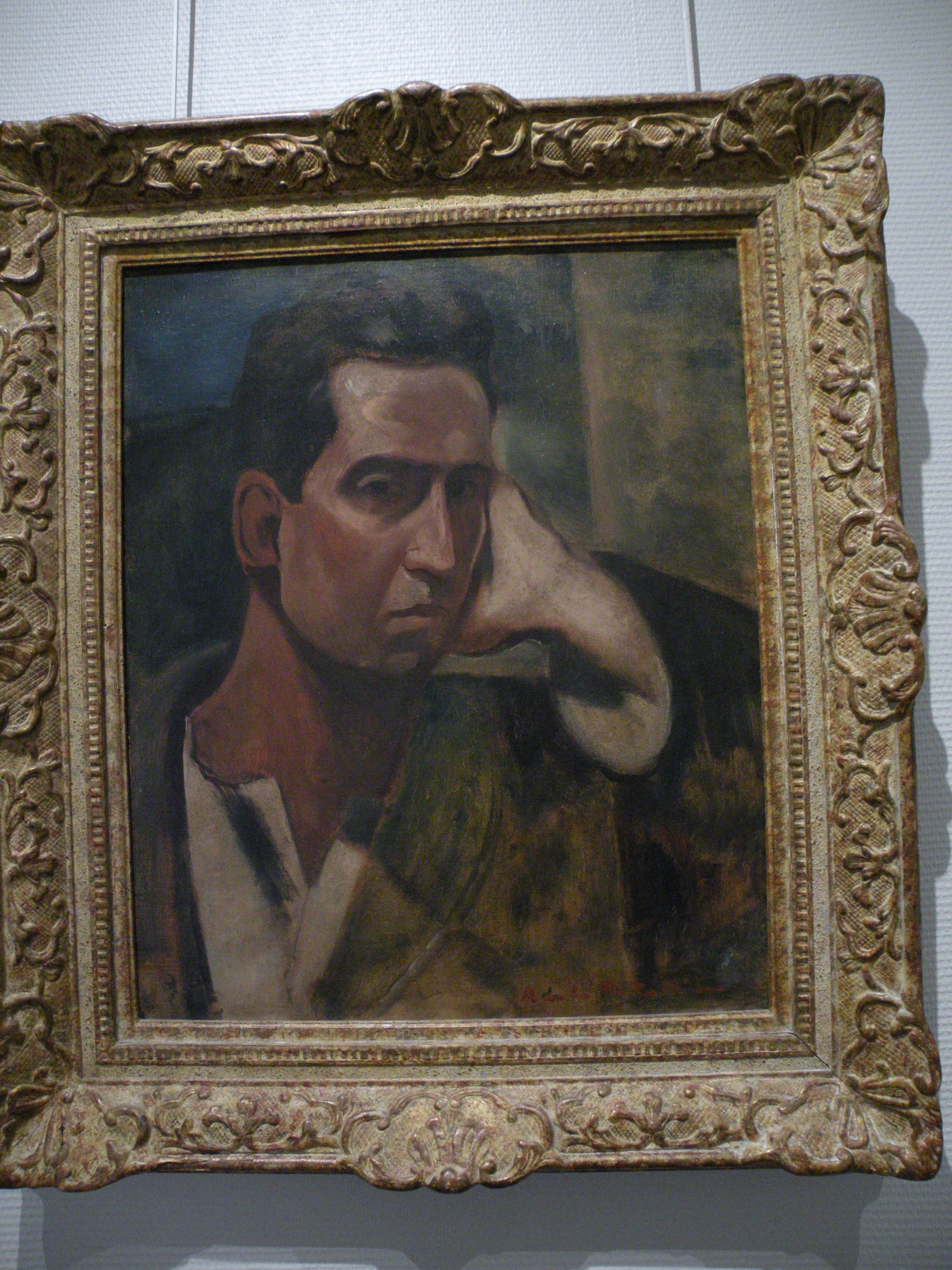 exposition Amédée de La Patellière au Musée départemental de l'Oise